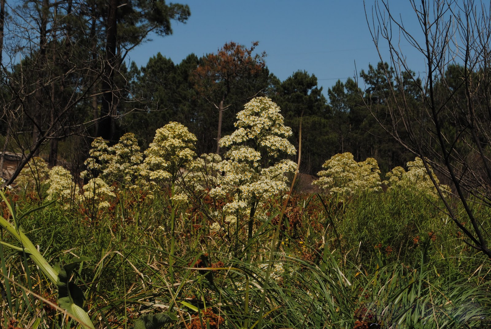 Senecio mattfeldianus. Asteraceae. Fotos tomadas en bañado al margen del Arroyo Pando y al margen de pequeñas cañadas cercanas al Autódromo en El Pinar, departamento de Canelones, Uruguay.